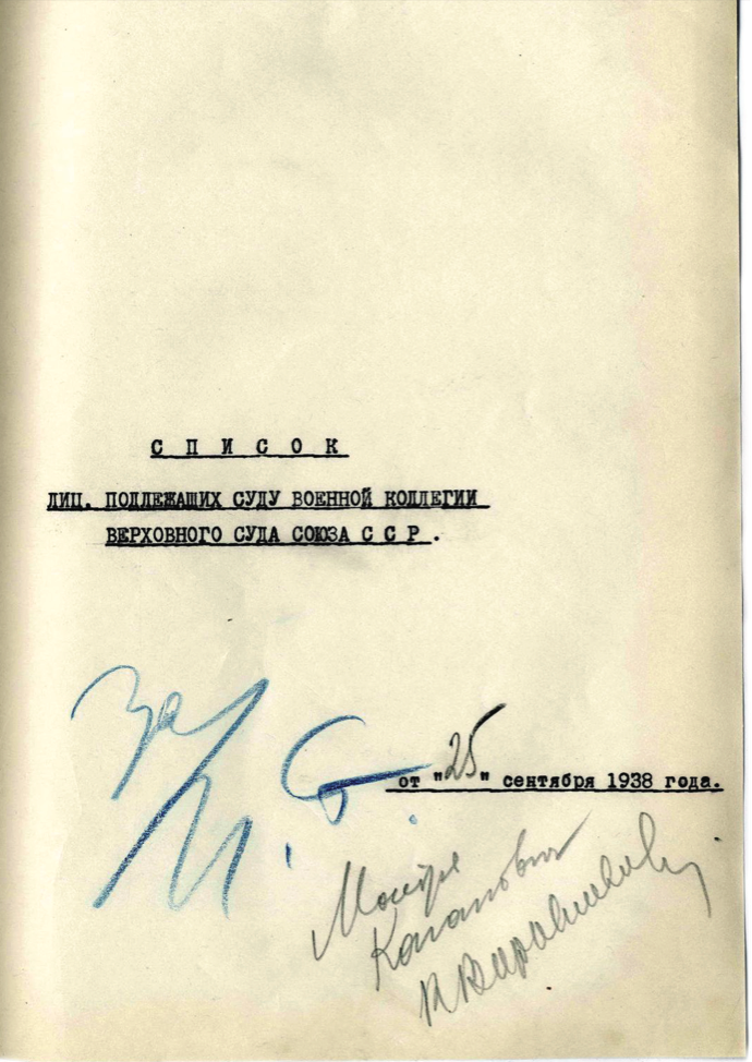 Ordre d'arrestation du père d'Aza Rakhmanova, Hasan Pacha Rakhmanov, paraphé par Staline